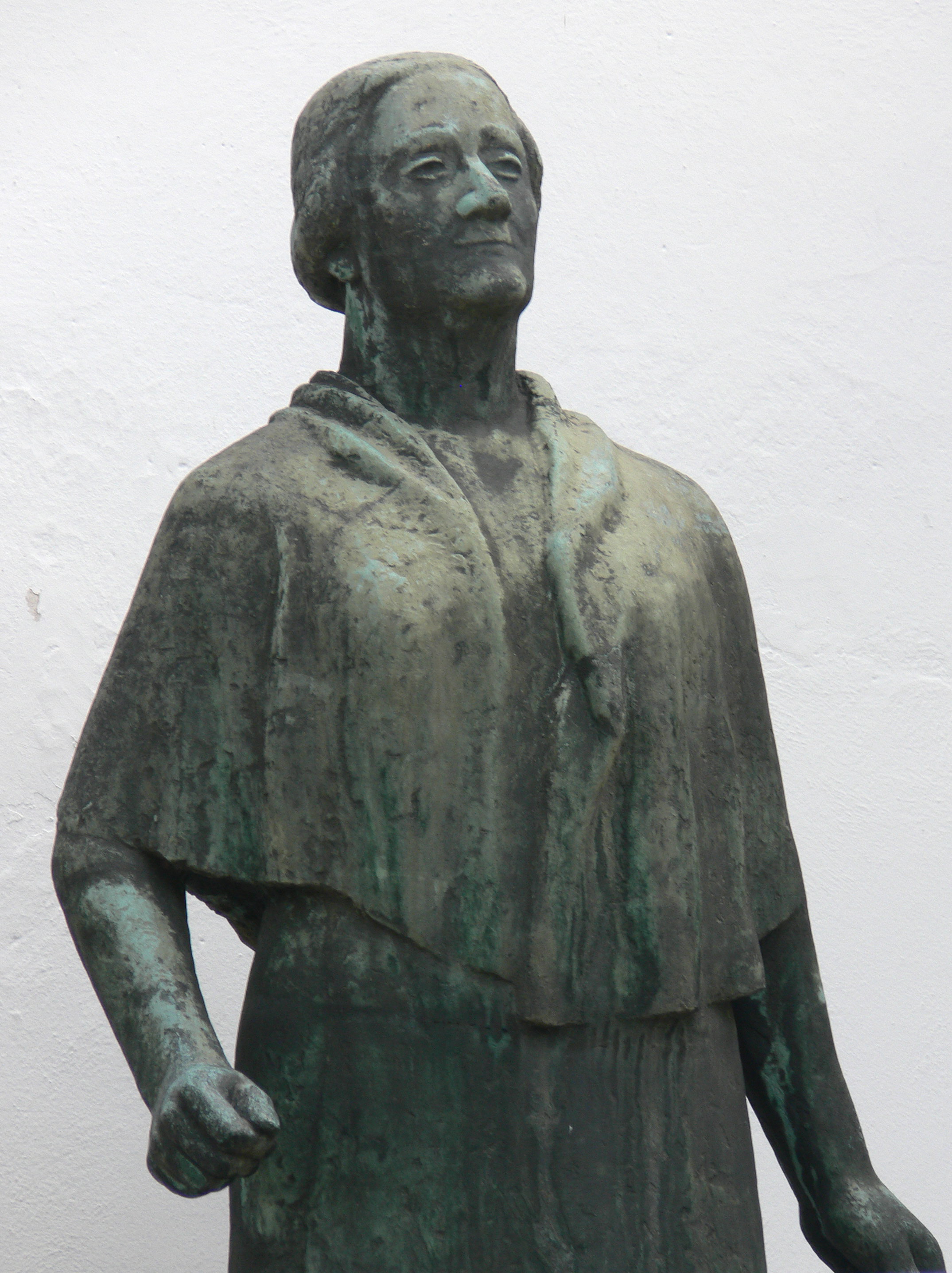 Königshain-Wiederau, Ortsteil Wiederau, Geburtshaus von Clara Zetkin, geb. Eisner Statue "Clara Zetkin"